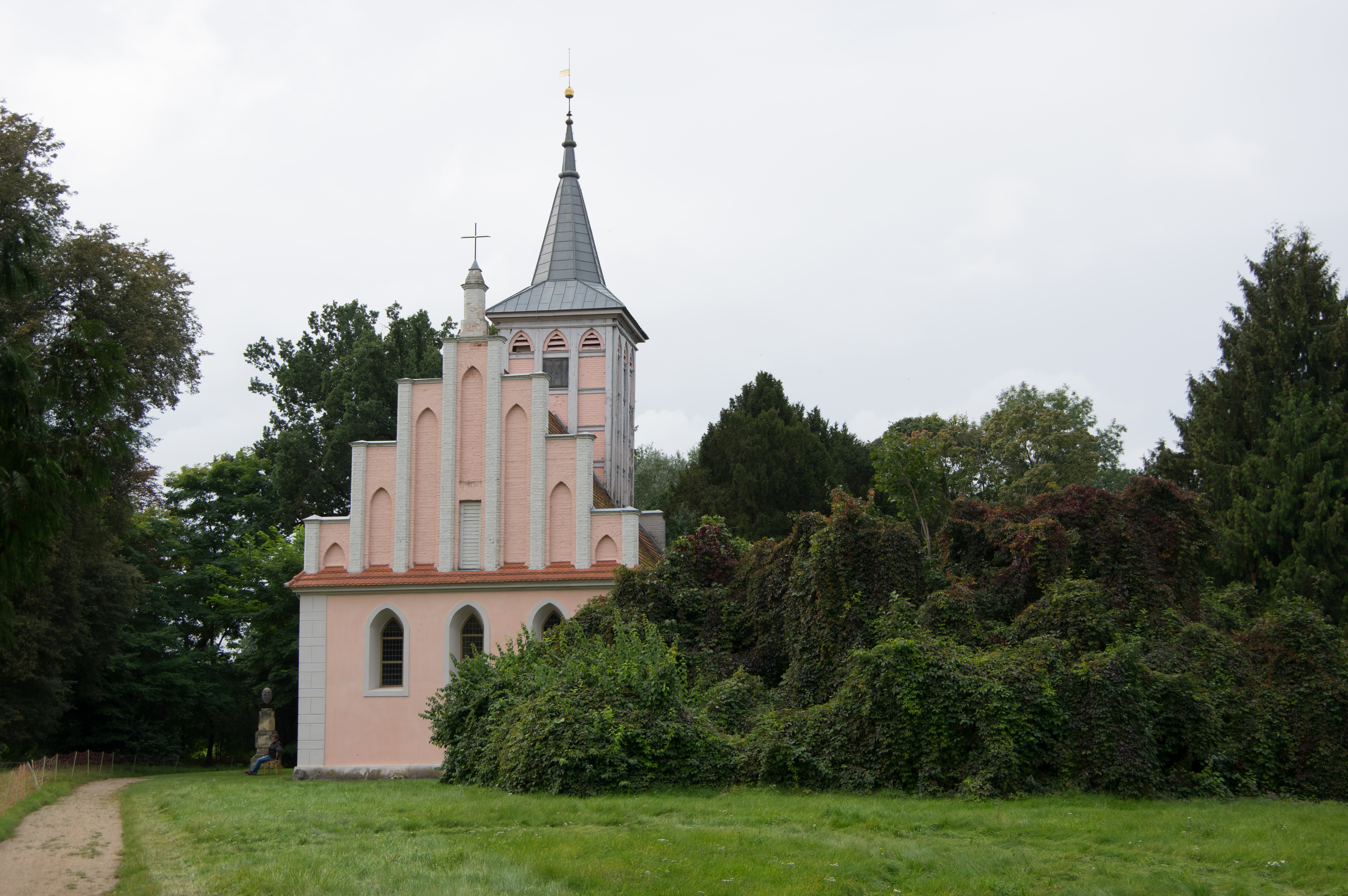 Schwedt/Oder, Ortsteil Criewen in Brandenburg. Die Kirche steht unter Denkmalschutz. Nach dem Dreißigjährigen Krieg wurde die Kirche wieder aufgebaut. Turm und Stufengiebel wurden 1830 hinzugefügt.